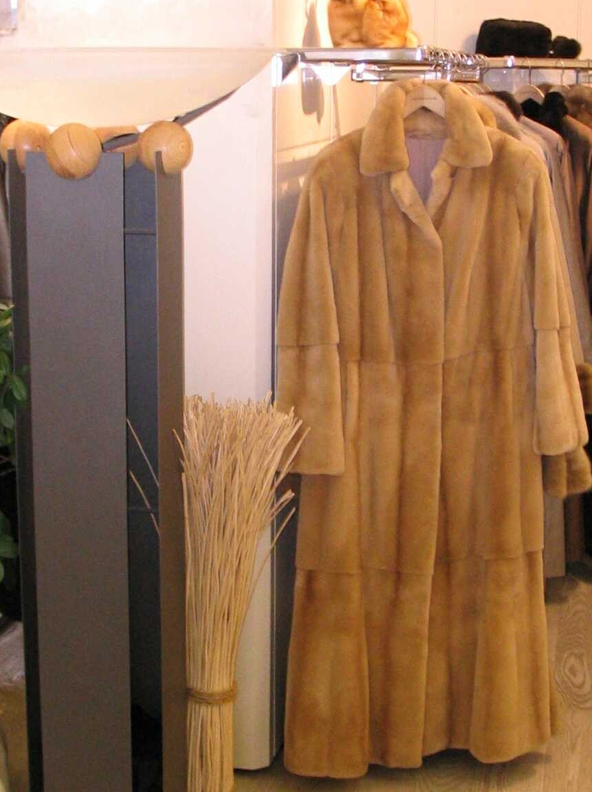 Gesehen in Firma Cychowski, Exerzierplatz 16, 24103 Kiel. Gegründet 1955. Eheleute Ute Wendt-Cychowski und Hans-Jürgen Wendt Samtnerzmantel, gefärbt, aufgesetzte Verarbeitung